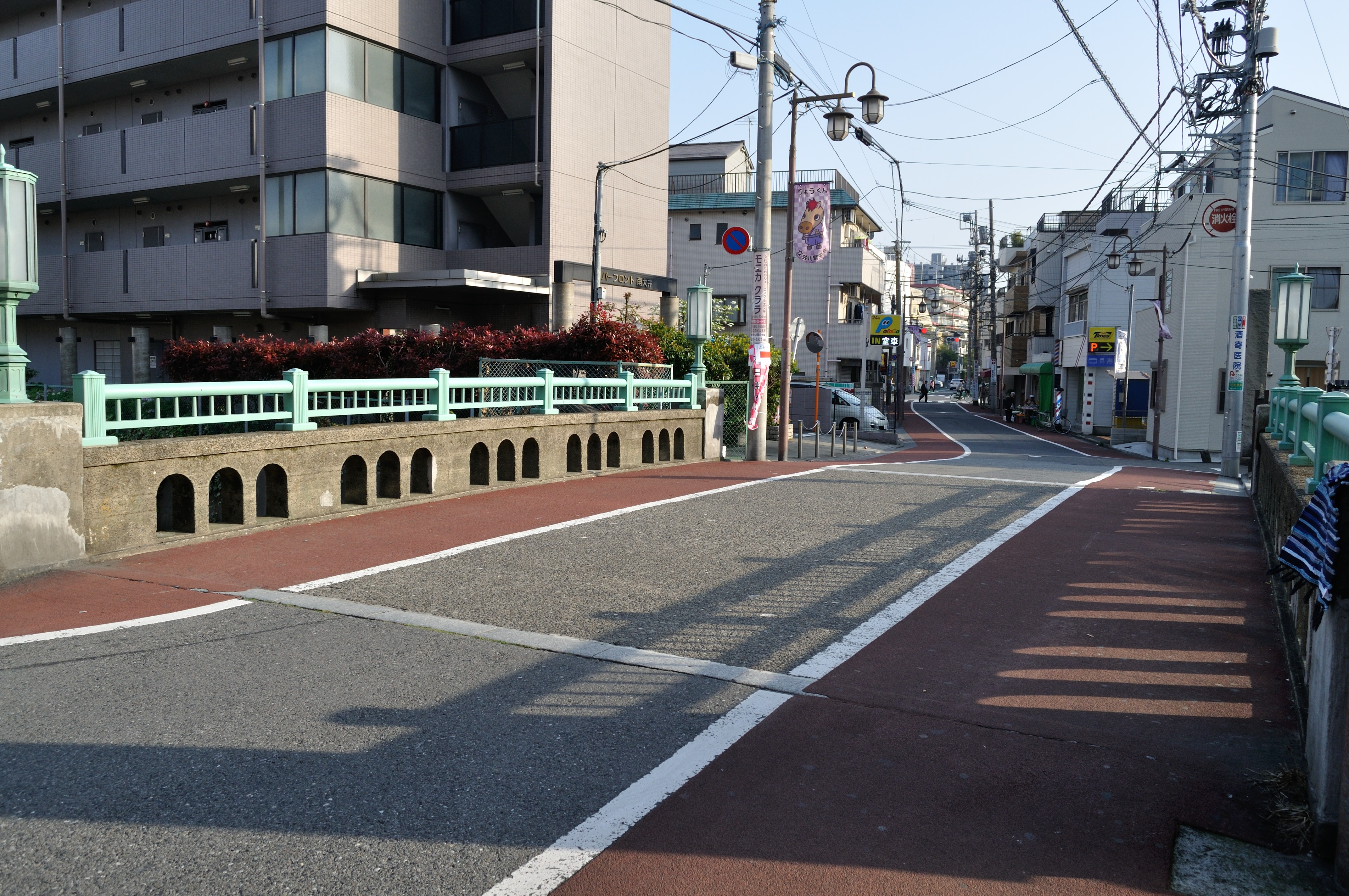 立会川に架かる泪橋（現：浜川橋） 東京都品川区